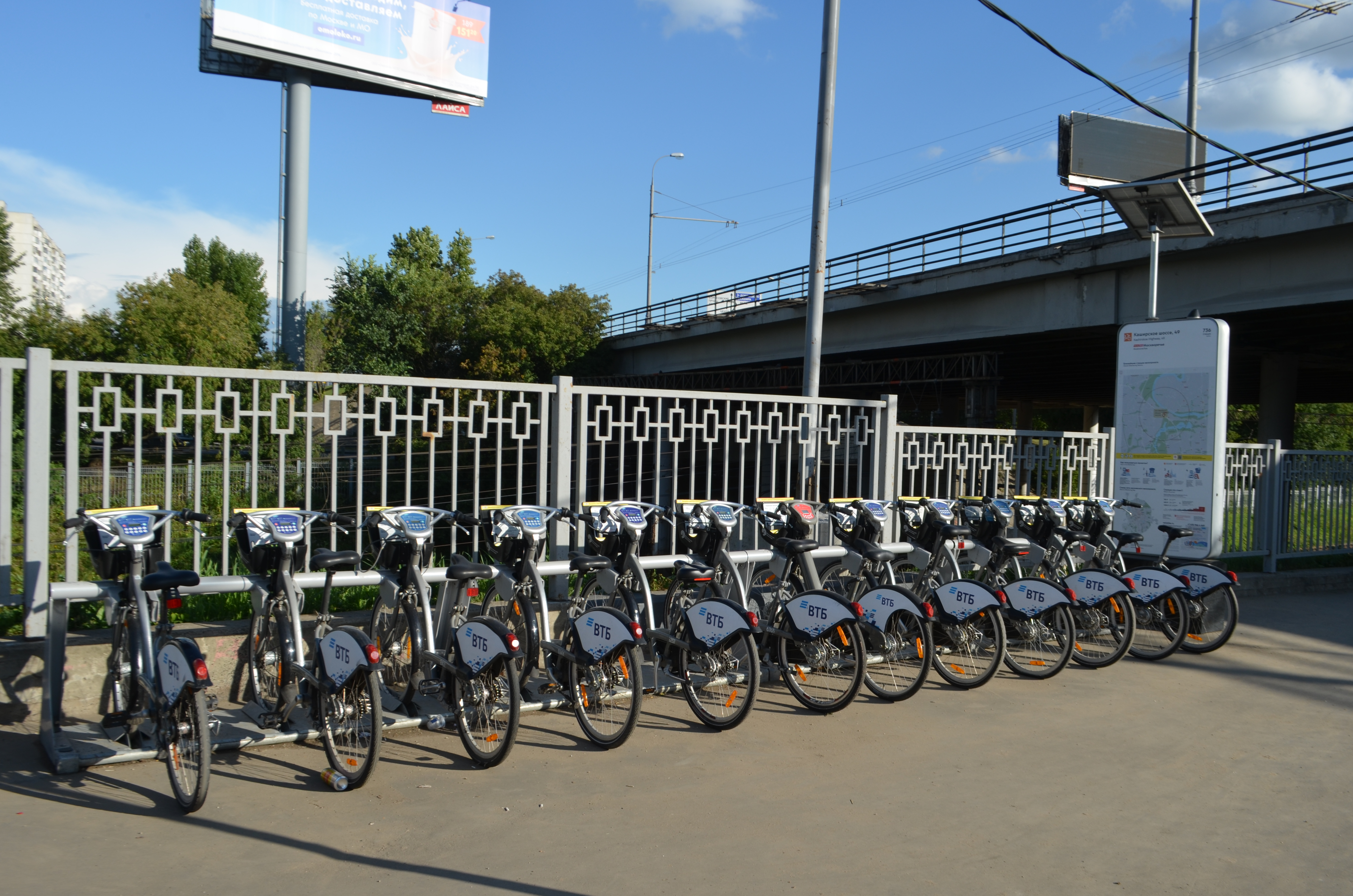 Станция «Велобайка» в Москве около станции МЦД (платформы) Москворечье. Сверху на фото виден Москворецкий путепровод Каширского шоссе.